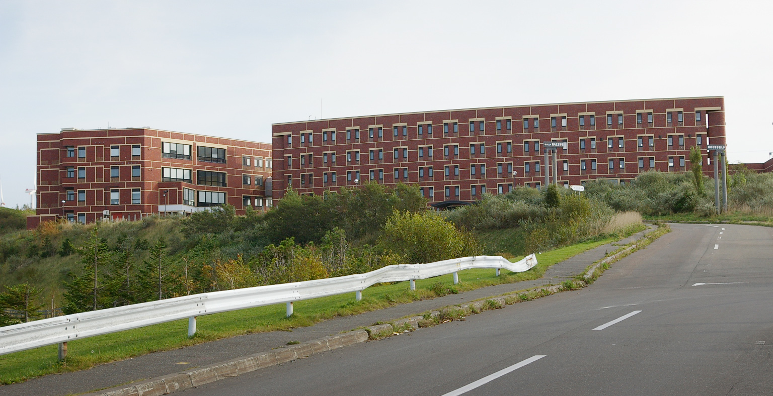 Wakkanai Hokusei Gakuen University.